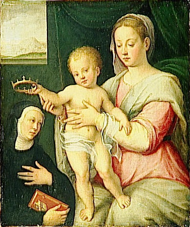 Joconde database: entry 000PE025618